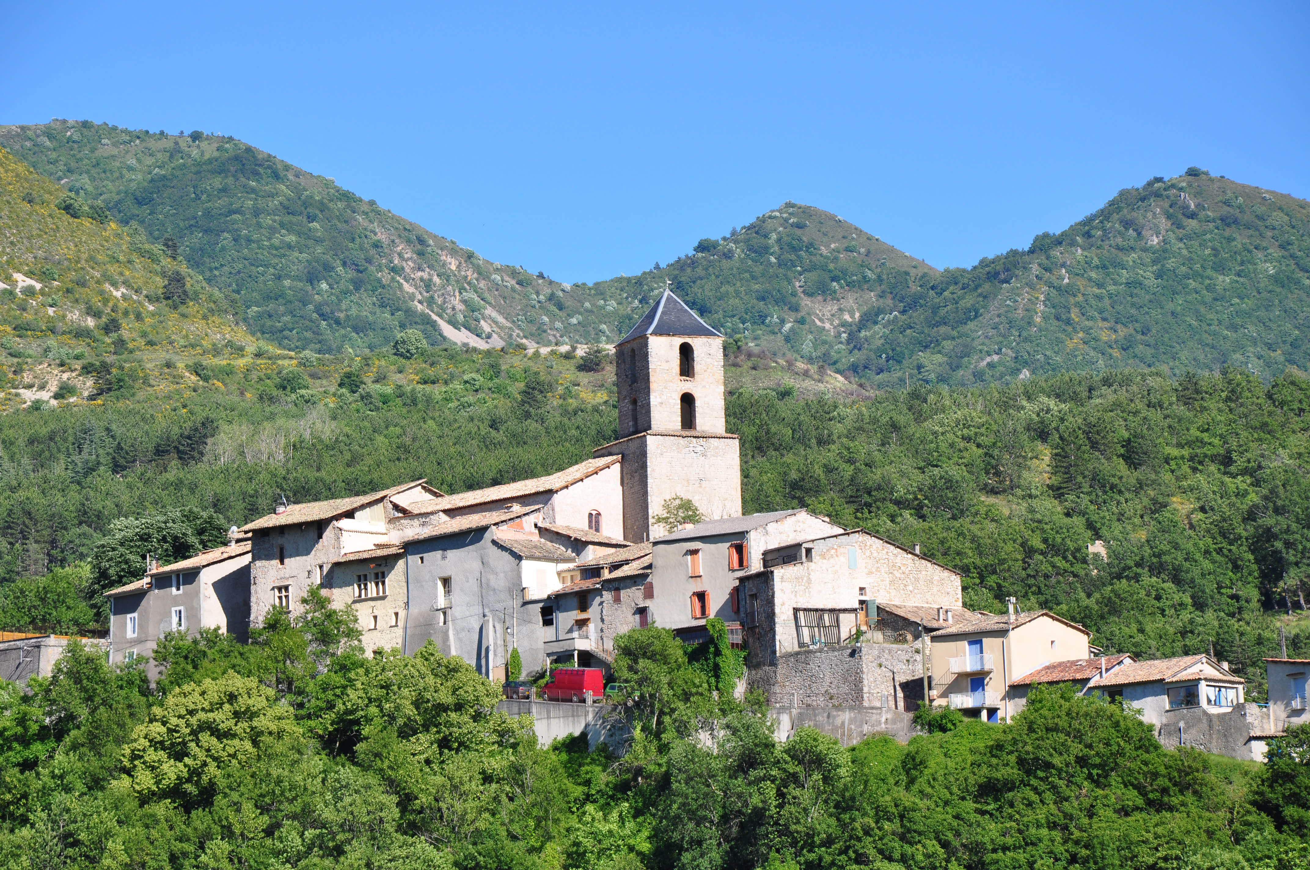 Barras, le village